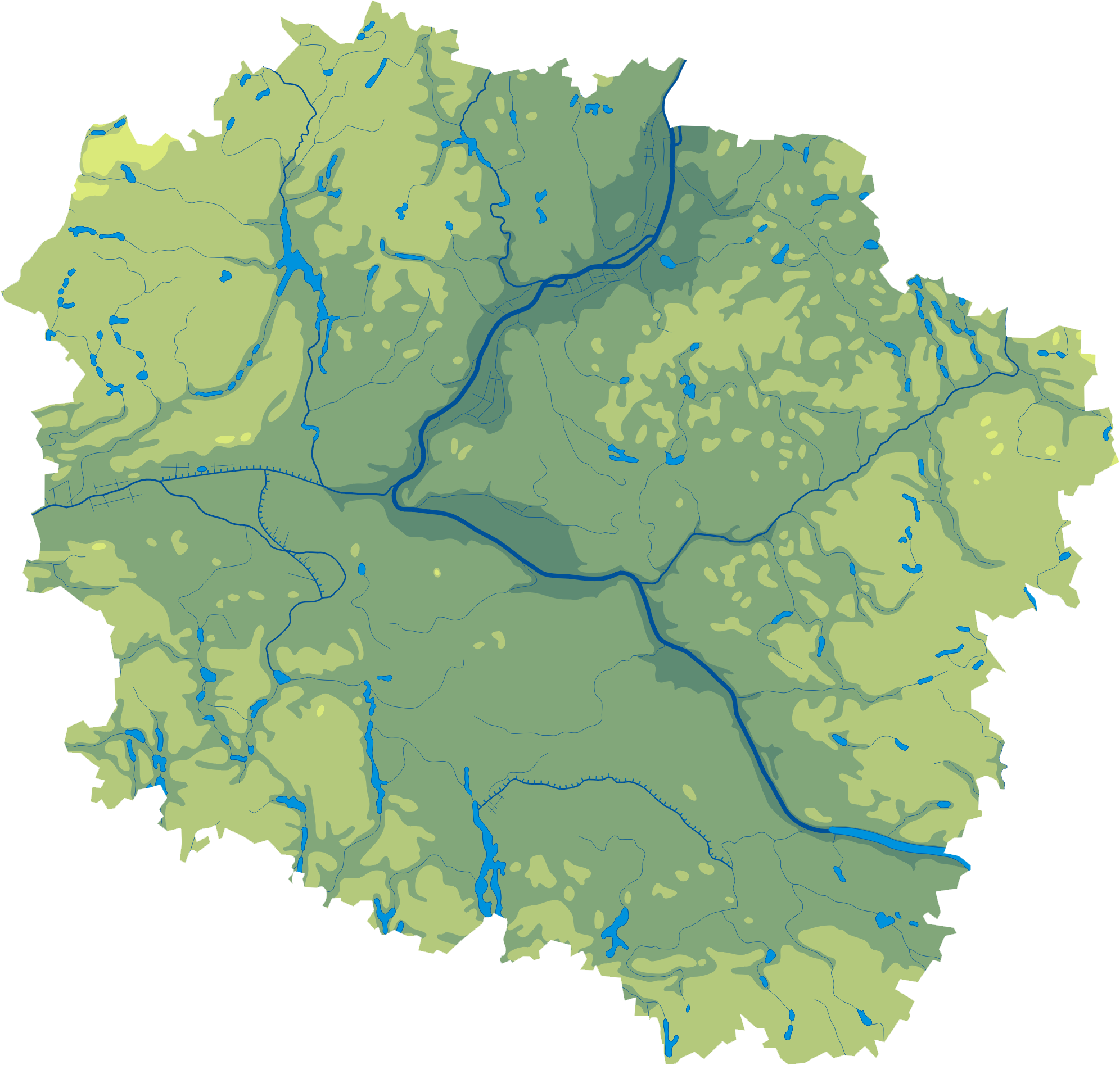 Mapa wód i ukształtowania powierzchni województwa kujawsko-pomorskiego. Autor: AotearoaWspółrzędne graniczne mapy: N: 53.7809° N S: 52.3306° N W: 17.2471° E E: 19.7617° E Legenda